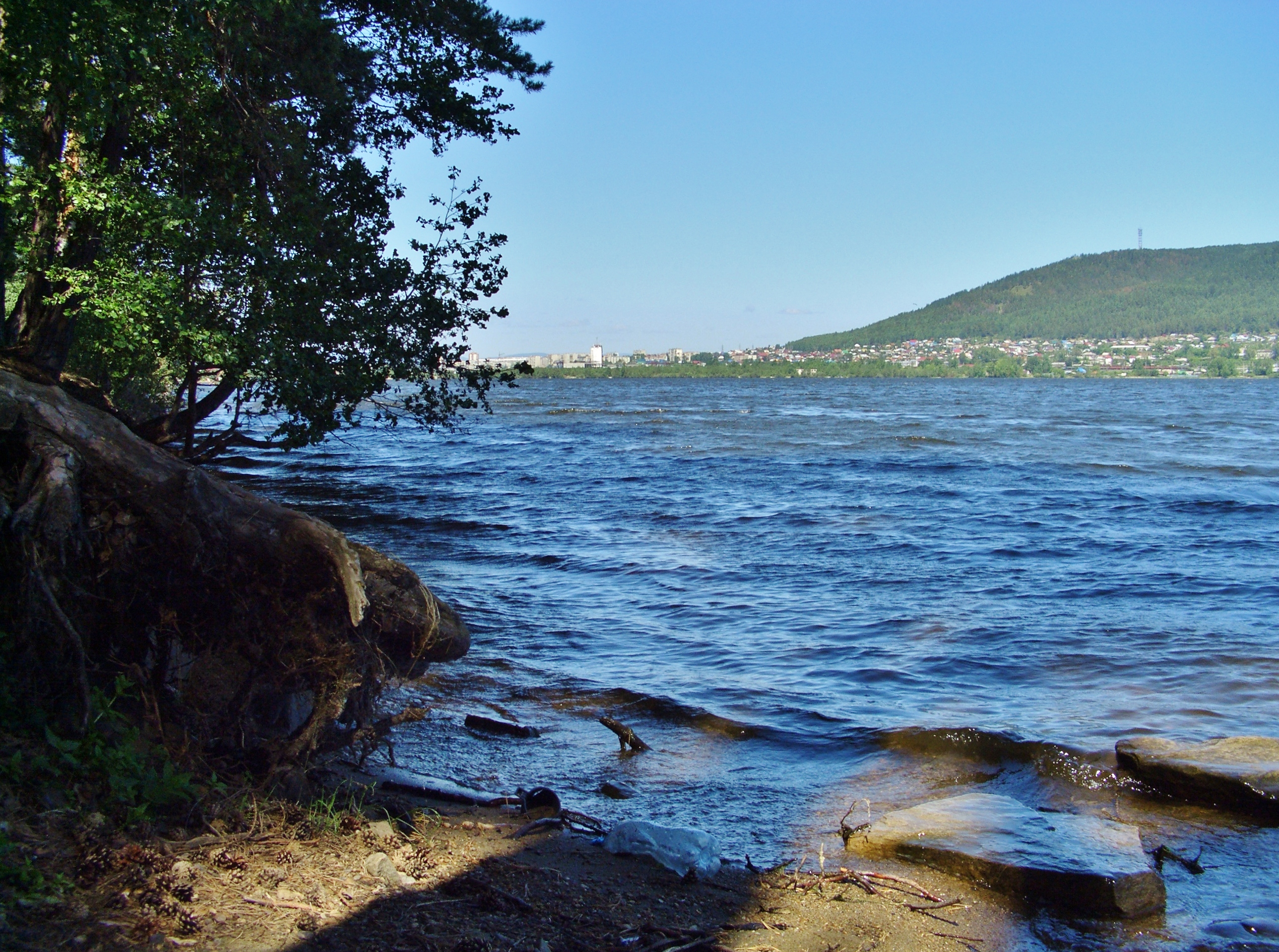 Ильменское озеро.